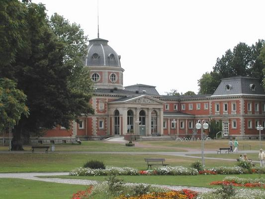 Foto des Badhauses in Oeynhausen